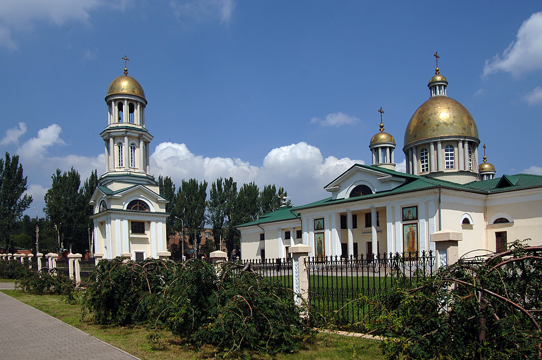 лето 2010